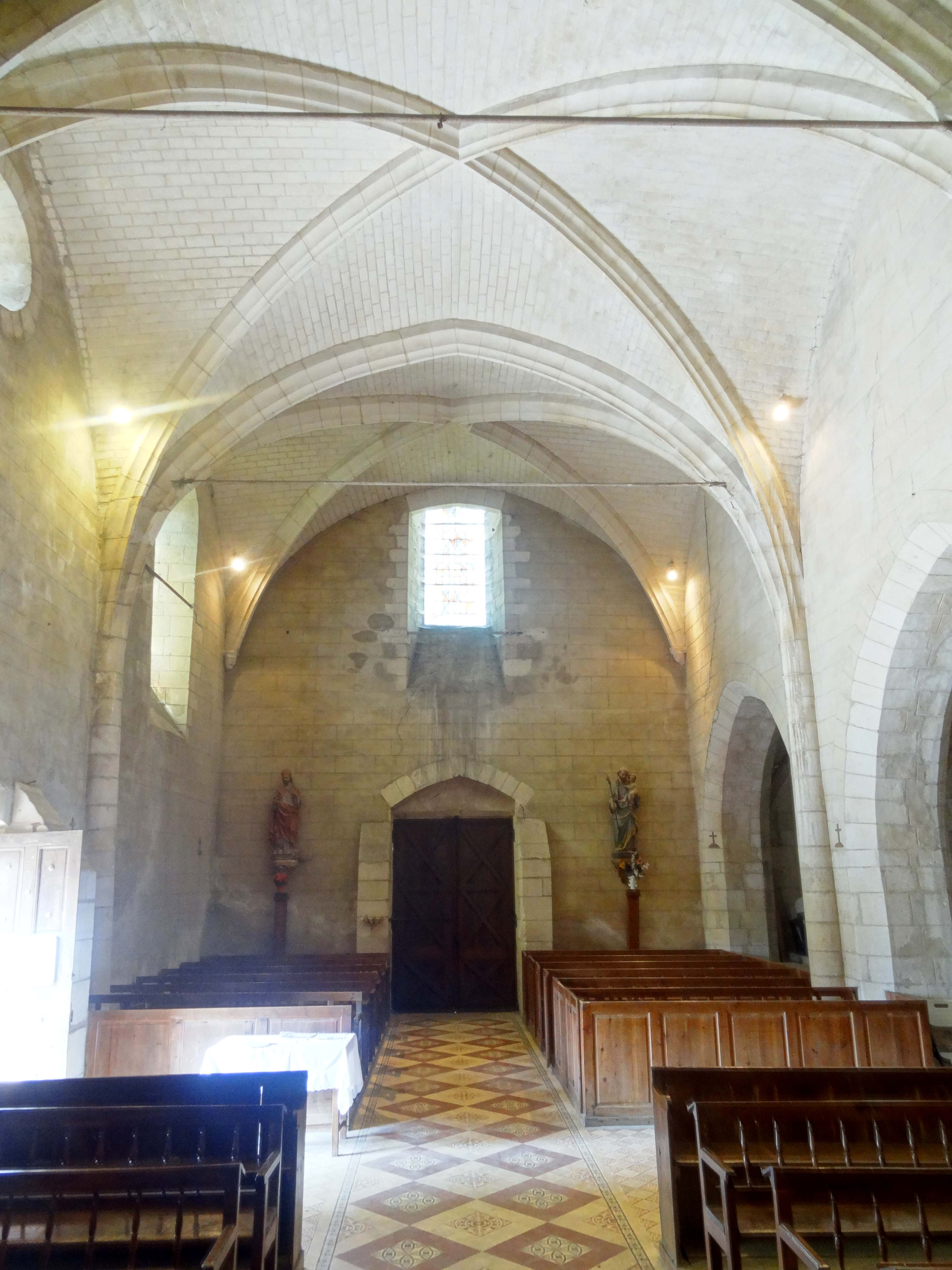 Intérieur de l'église - voir titre.